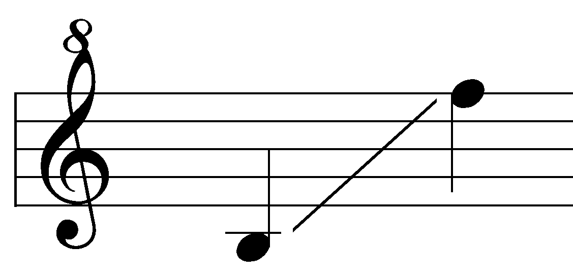 Tesitura de la gaita asturiana